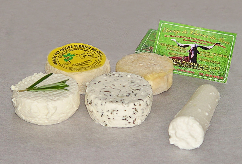 Fromages du Rove